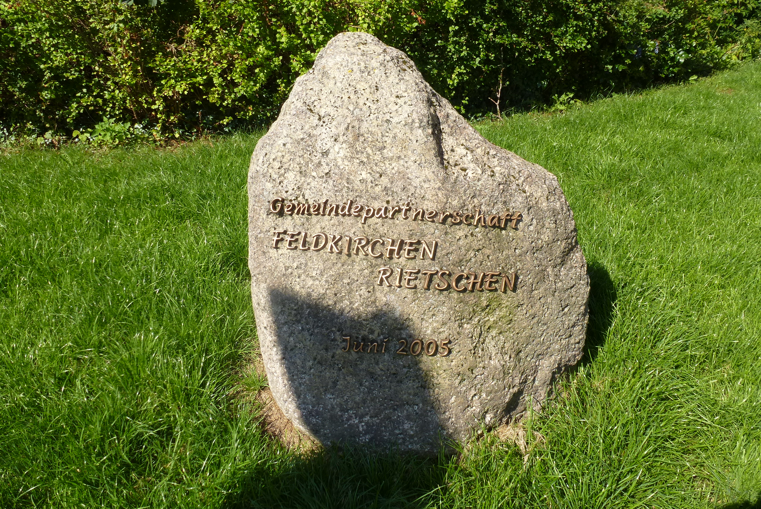 Feldkirchen bei München, Ortspartnerschaft, Findling aus Rietschen (Freistaat Sachsen)